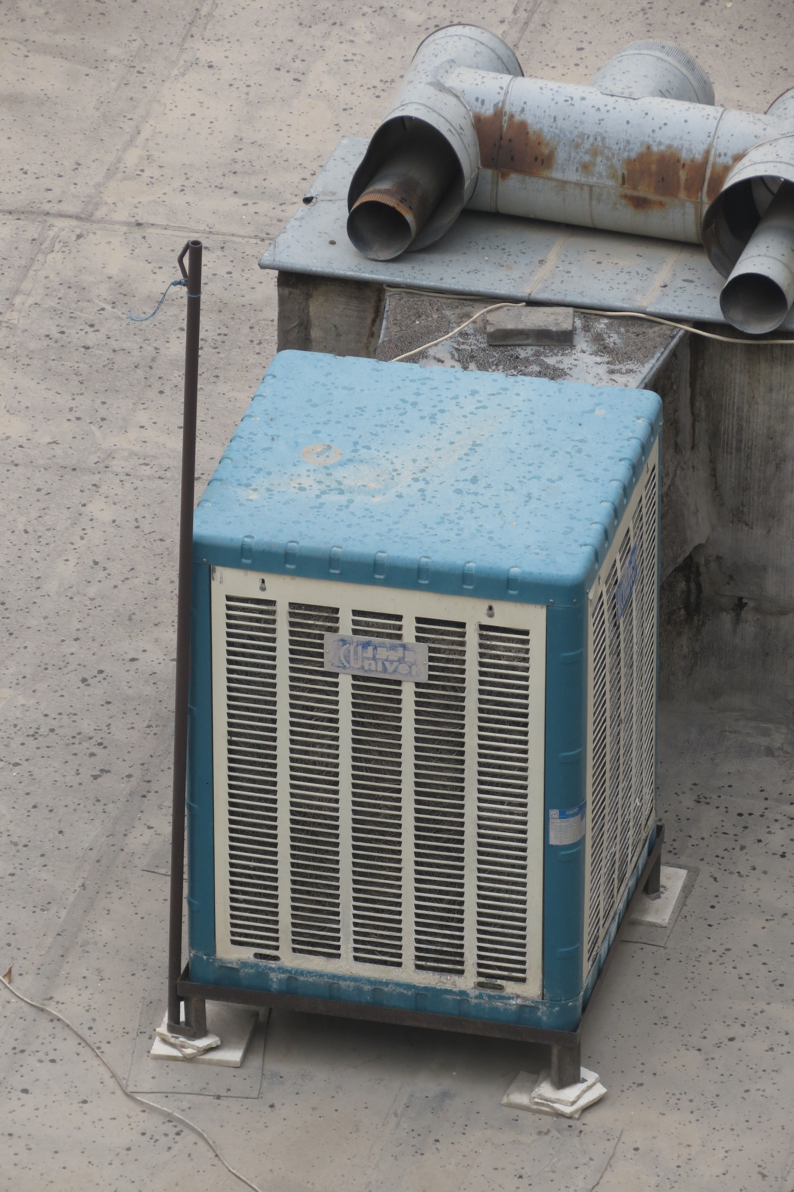 کولر آبی در شهر تهران